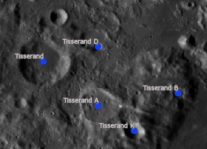 Cráter lunar Tisserand. Cráteres satélite. (Imagen LRO)